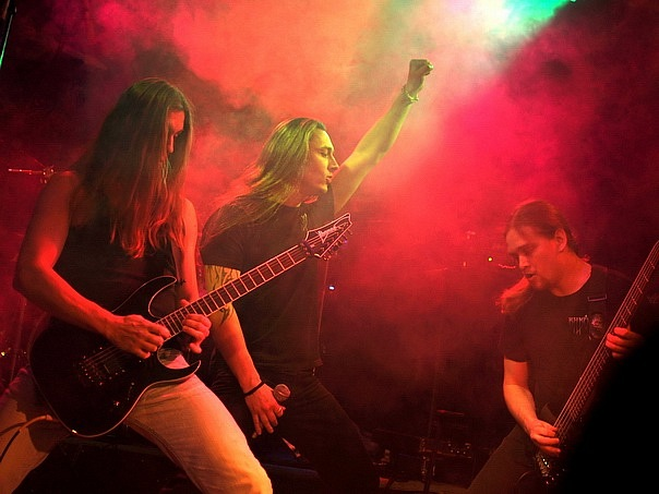 фото группы «Виконт»